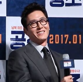 12월 16일 영화 '공조' 제작발표회 현장